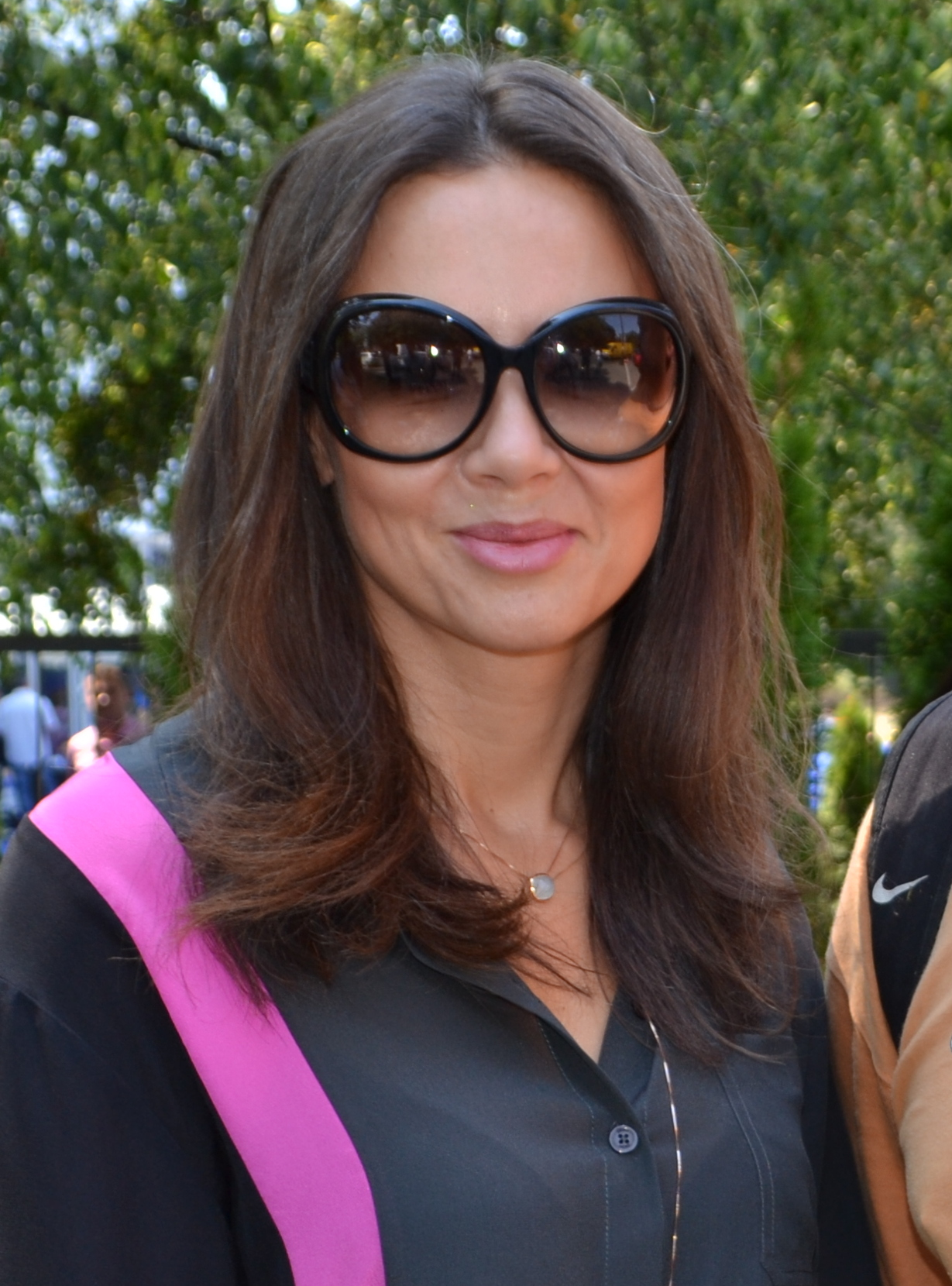 Kinga Rusin, polska dziennikarka.